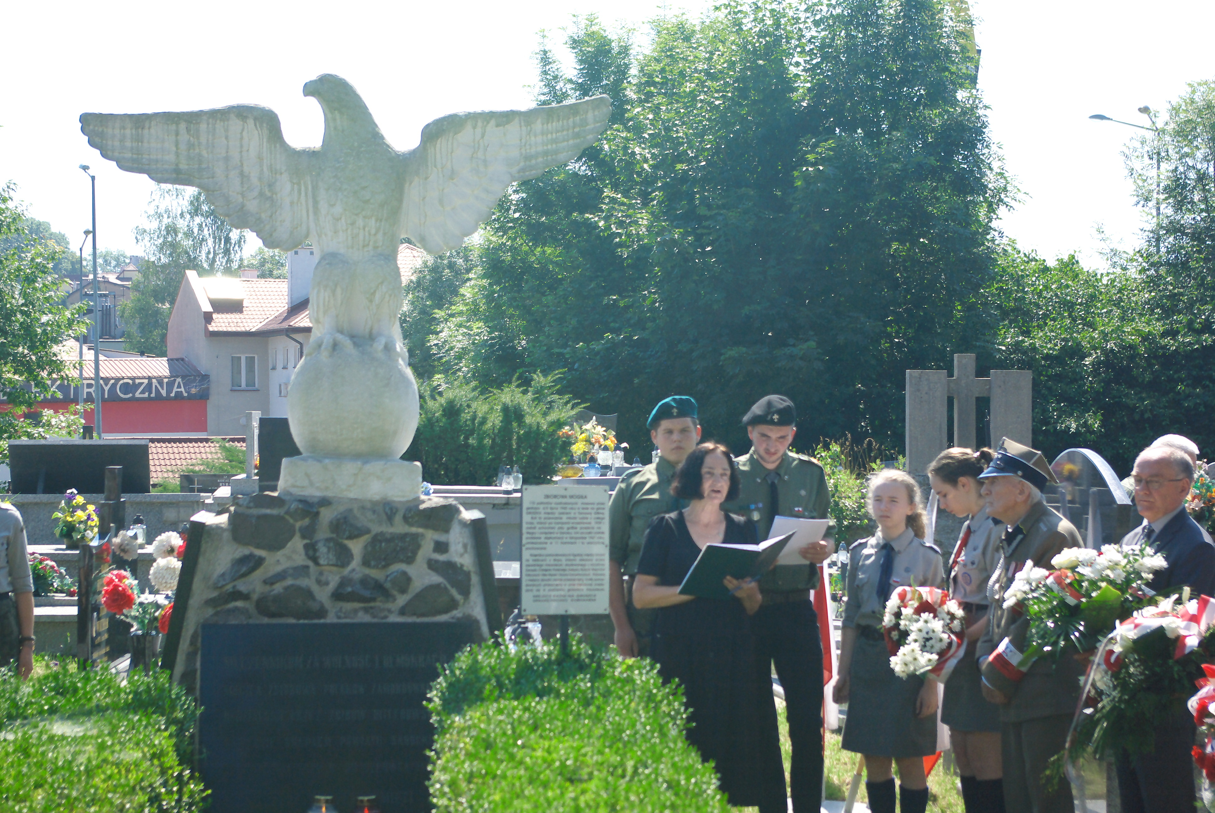 Uroczystości upamiętniające egzekucję na Gruszce z 1940 (2020)